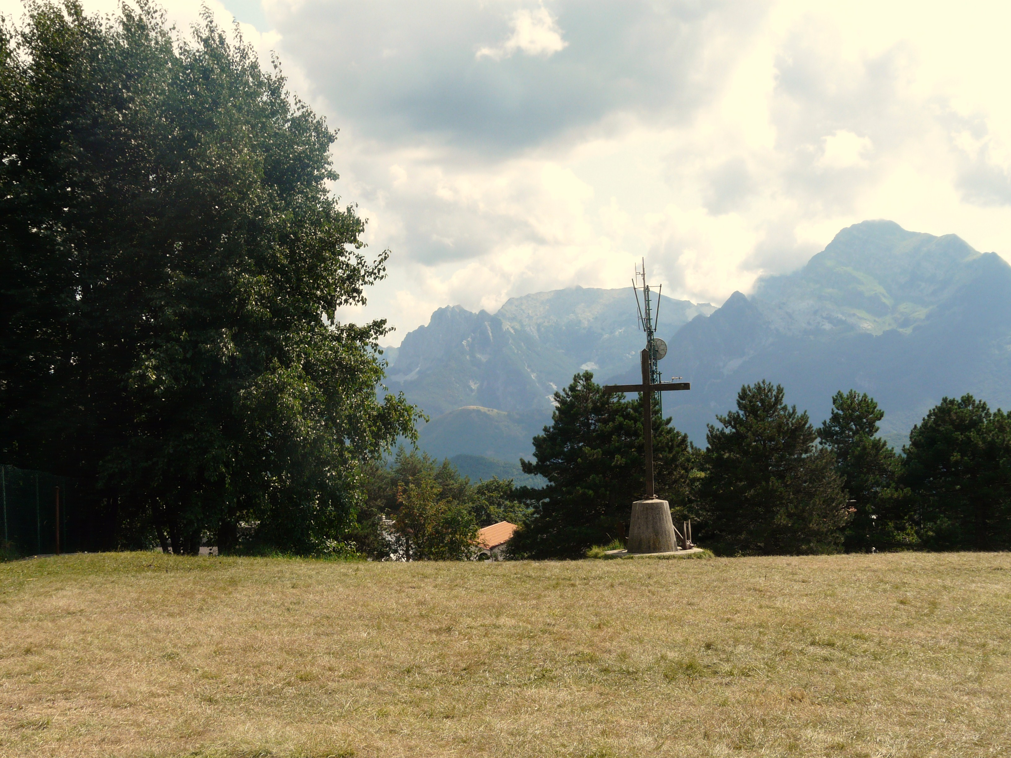 Monte Argegna, Giuncugnano, Toscana, Italia